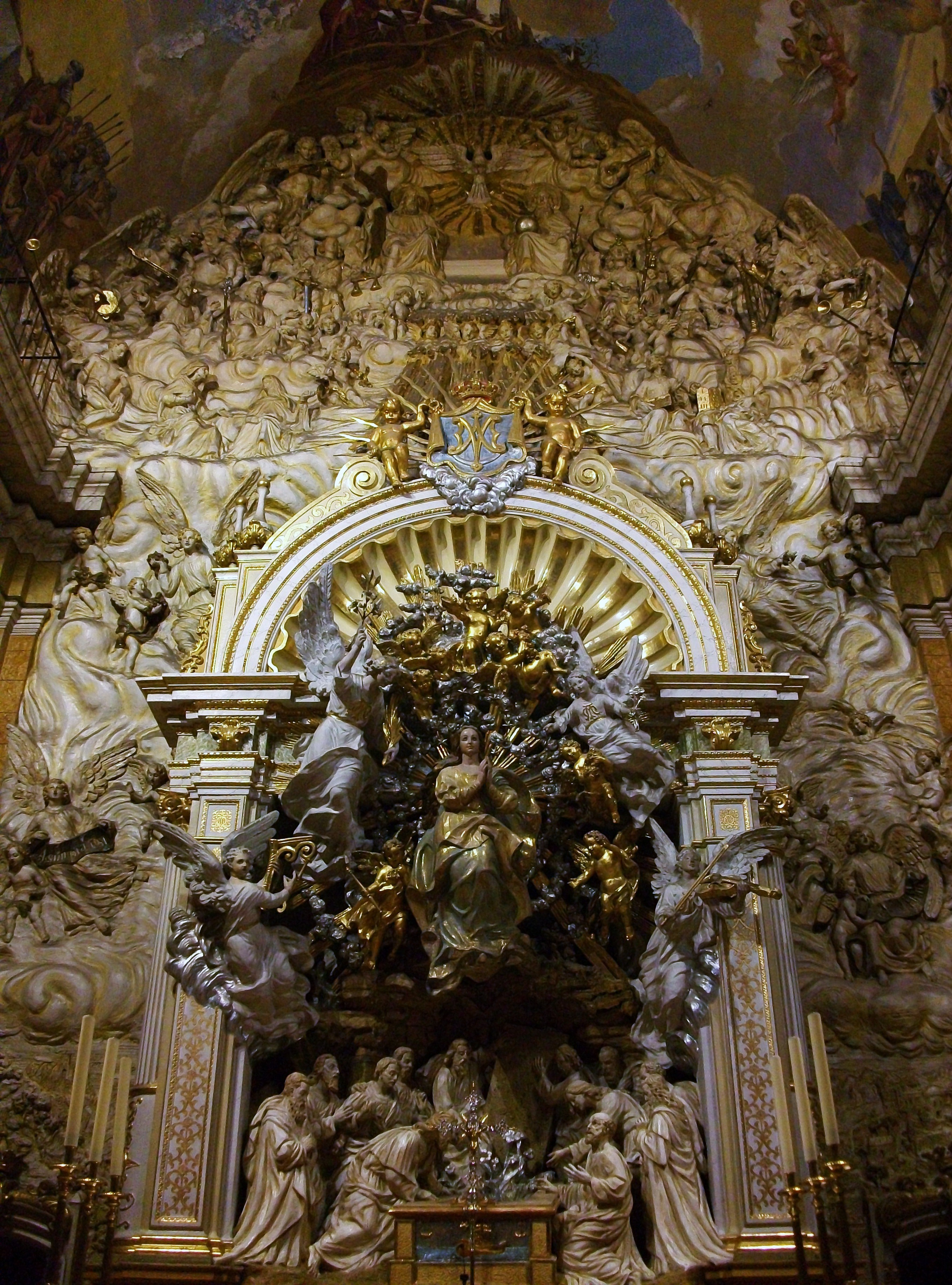 Altar major de l'església de l'Assumpció, Onda, Plana Baixa, País Valencià.